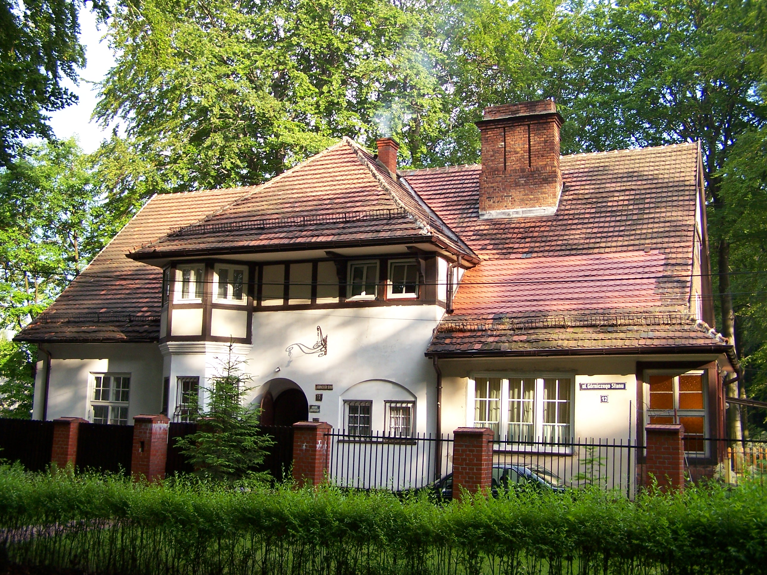 Jedna z zabytkowych willi na osiedlu Giszowiec w Katowicach.